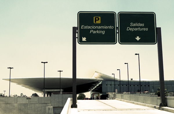 La Aurora International Airport